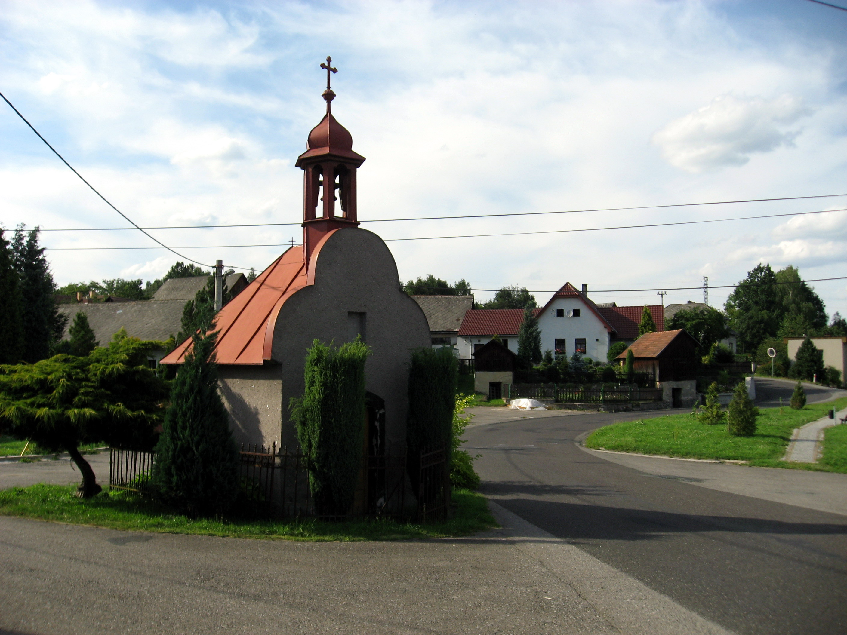 Meziklasí